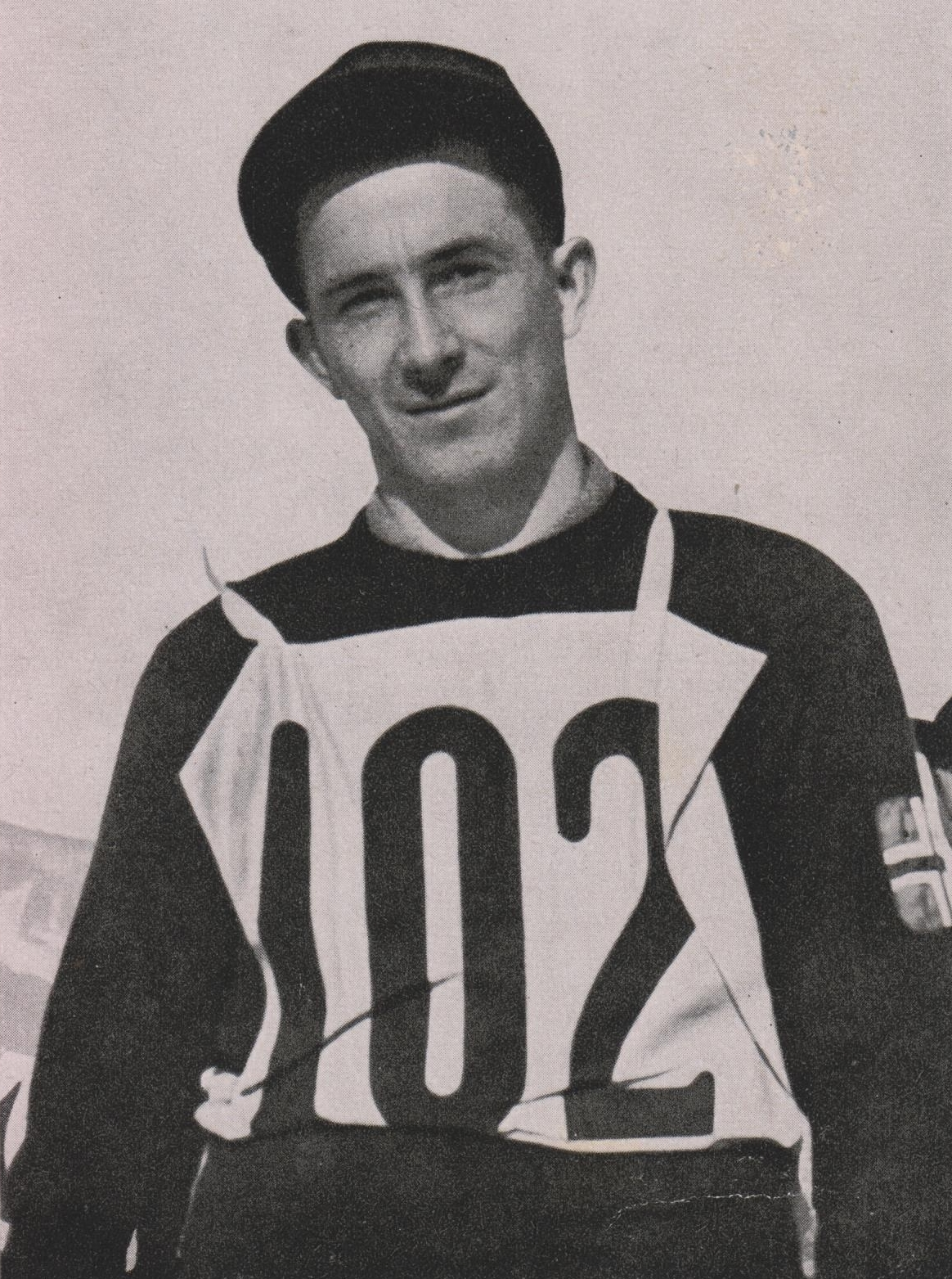 Olaf Hoffsbakken en 1936